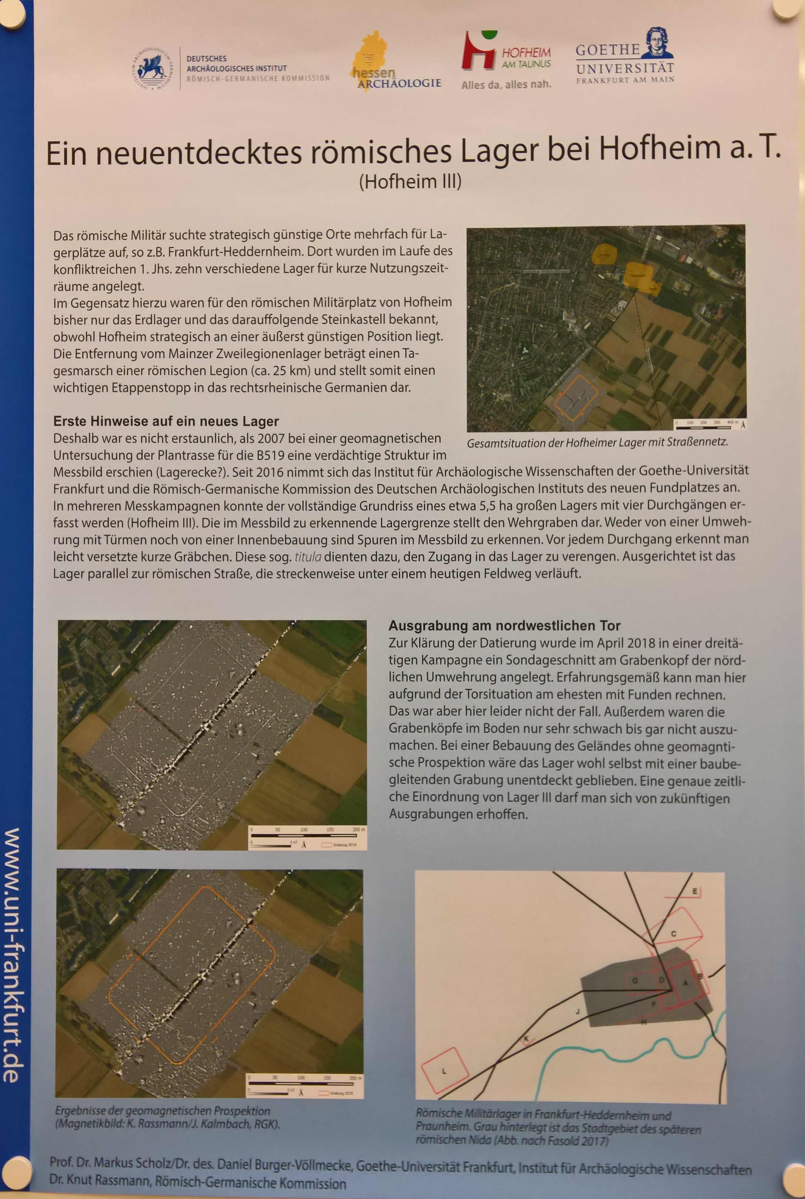 Öffentliche Schautafel zum hessenARCHÄOLOGIE-Tag 2018 in Hofheim im Taunus zum untersuchten neuen römischen Militärlager "Hofheim III"